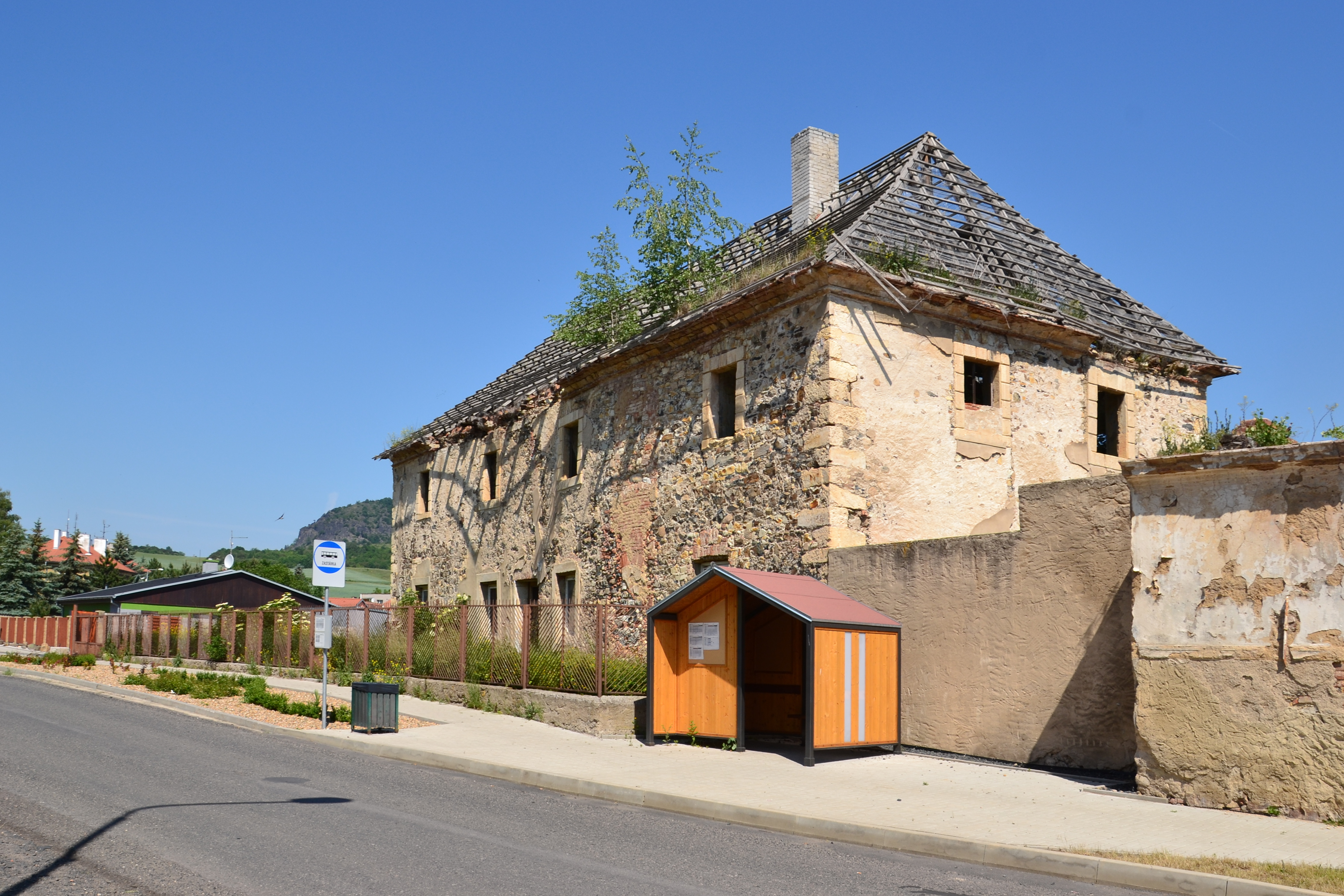 Zámek z jihovýchodu